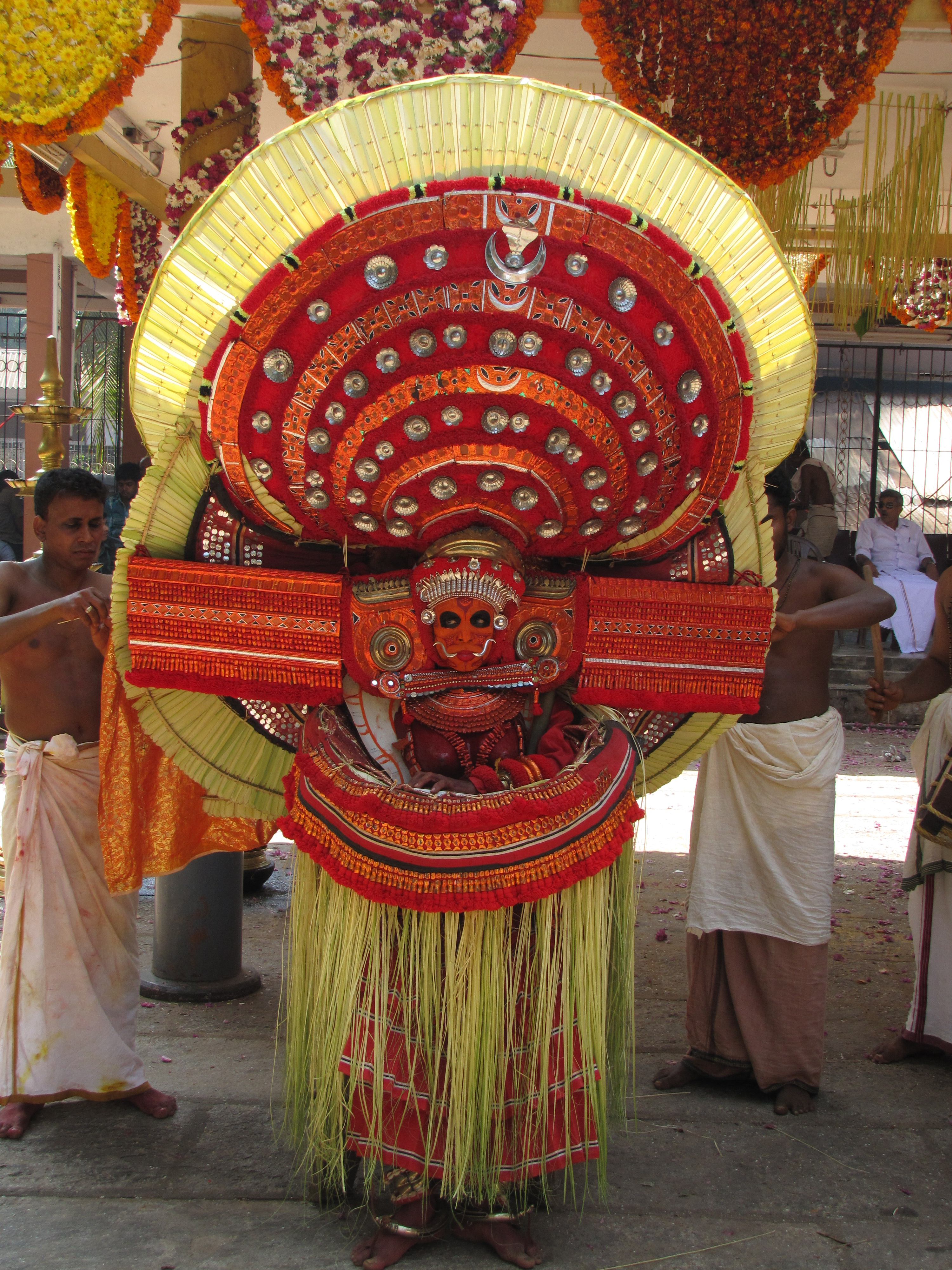 Cheralath Bhagavathi from Sree Manyottu Devalayam, Kanhangad